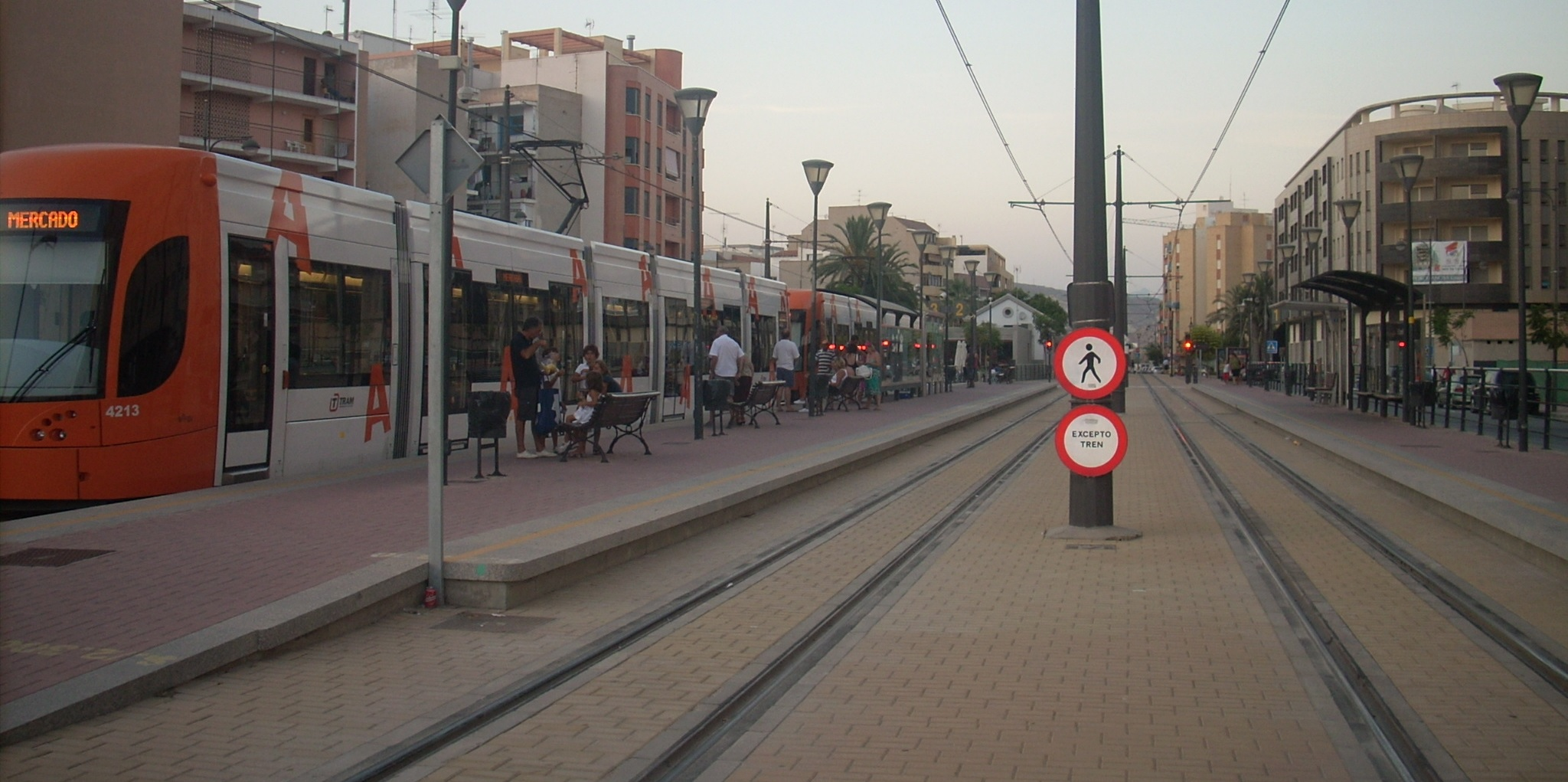 Estación termino de la L3 con un Bombardier en composición doble estacionado en la vía apartadero.